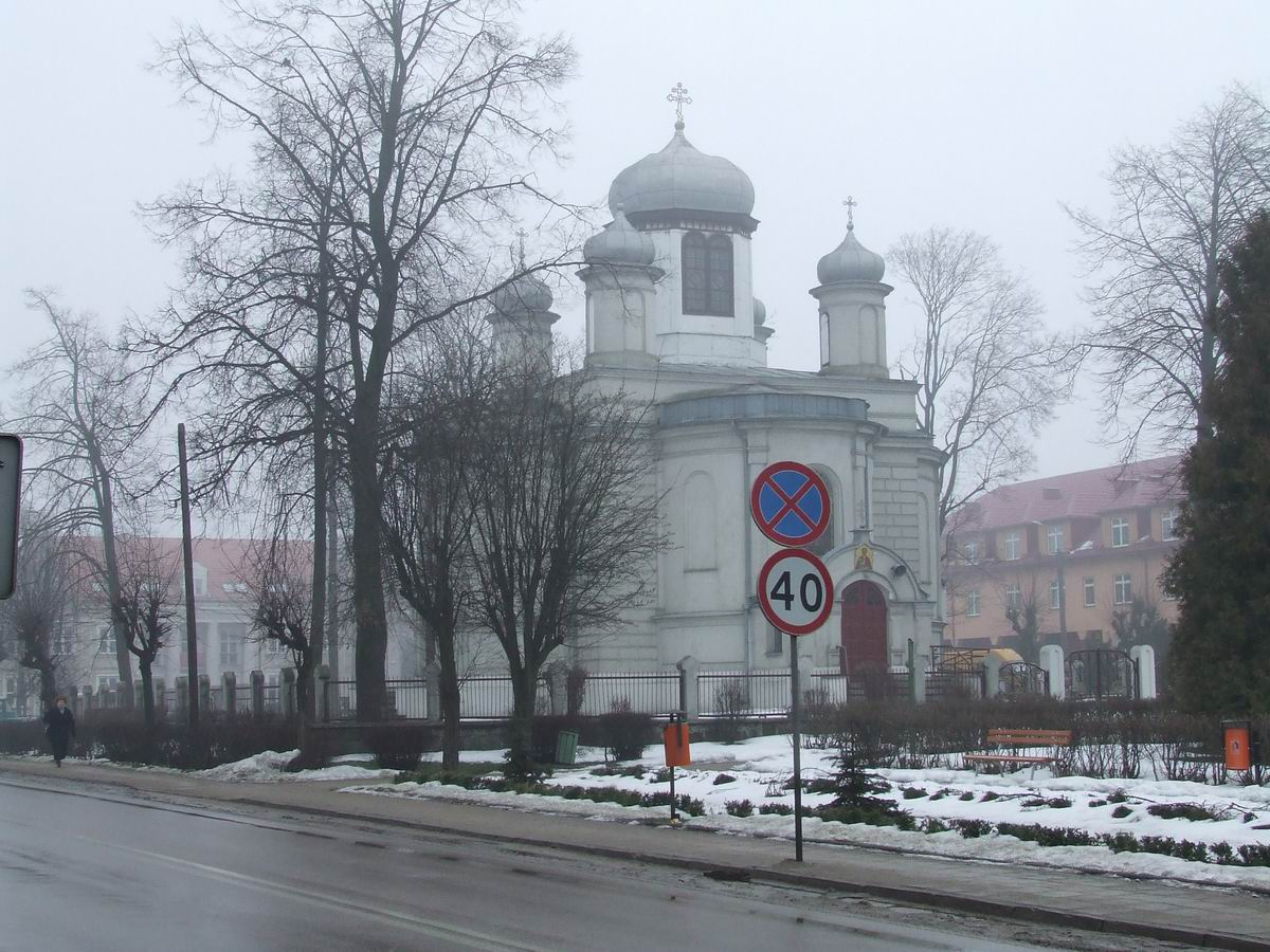 Cerkiew w Sokółce.